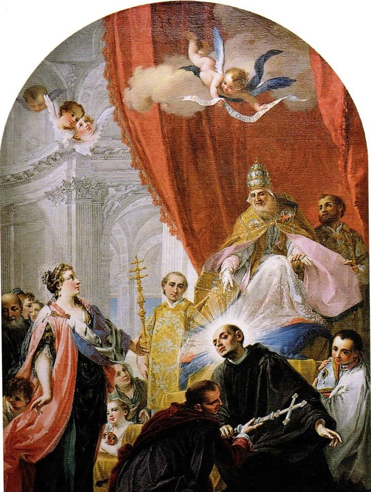 Ritratto ritraente Sant' Anselmo con Gregorio VII e Matilde di Canossa